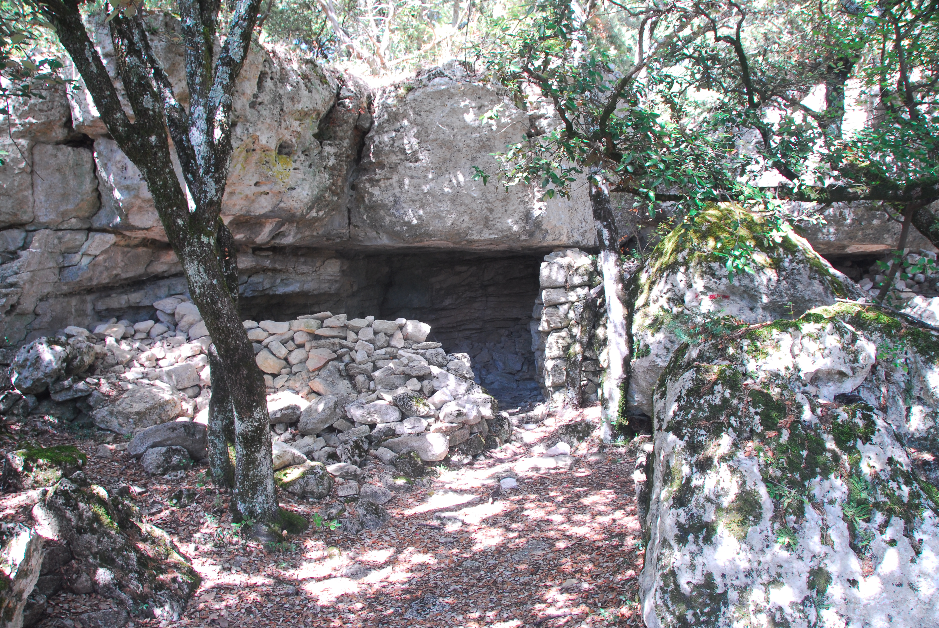 Prieuré de Ganagobie, Grotten am Nordende des Plateaus